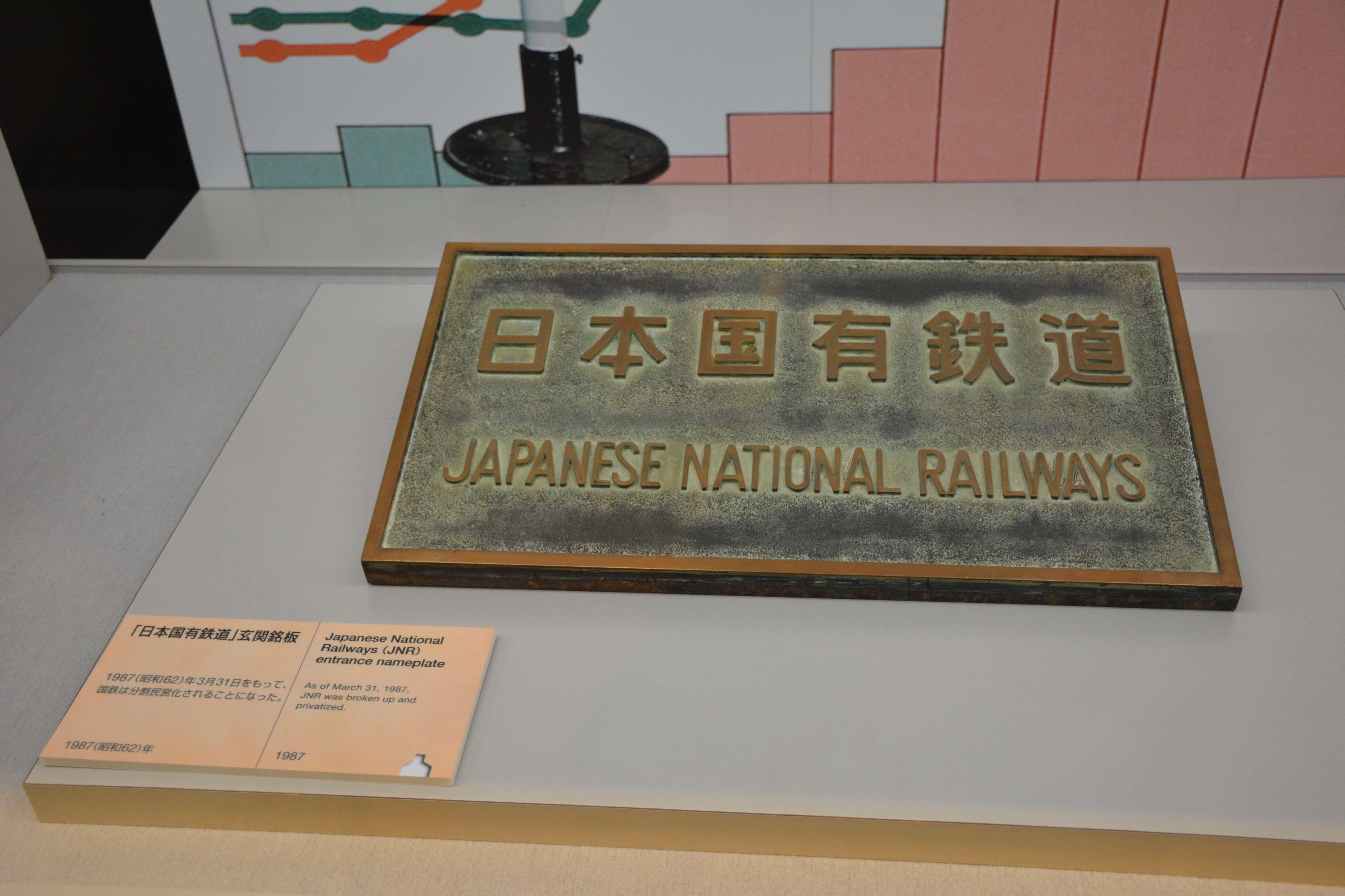 鐵道博物館展示的日本國有鐵道總部玄關銘板。